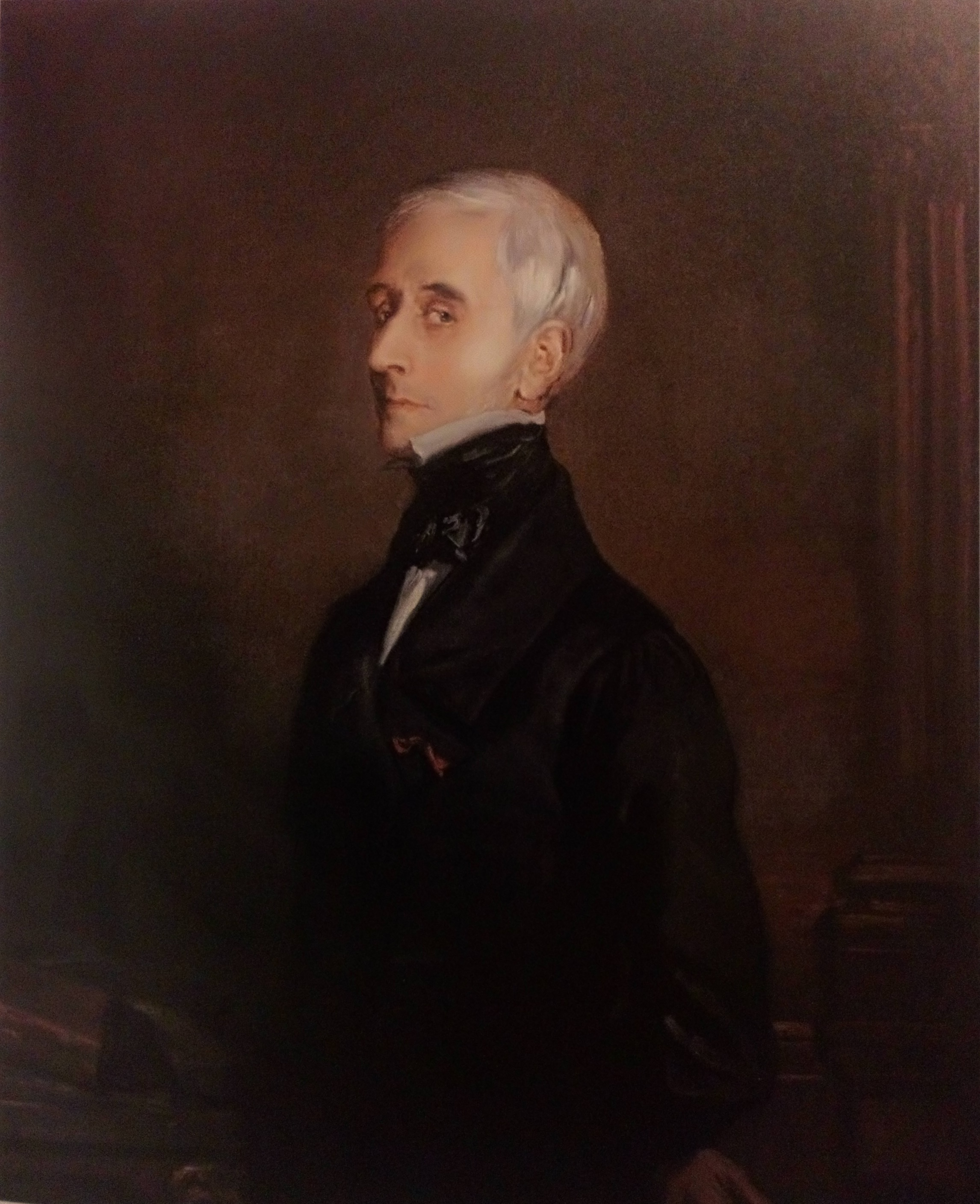 Portrait du comte Emile Desages par Théodore Chassériau (1819-1856) en 1848